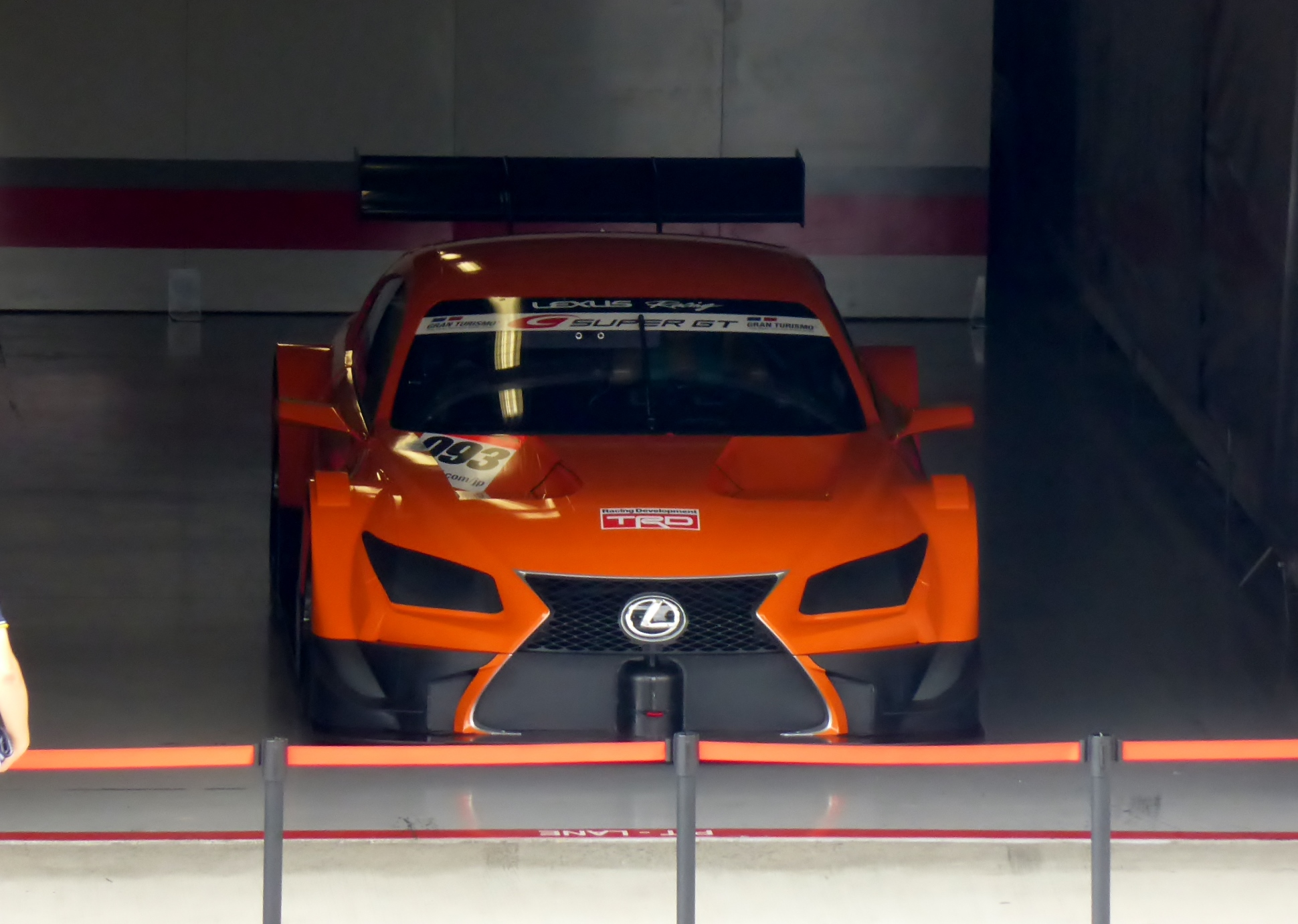 第42回インターナショナルポッカサッポロ1000kmでピット内に展示されたレクサス・LF-CCをベースとした2014年規定GT500車両を撮影。この時は灯火類等がダミーだったが後に機能するようにされている。後日みんカラにもアップロード予定